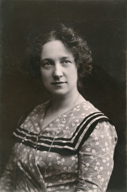 Portrett av Johanne Dybwad, c. 1900.